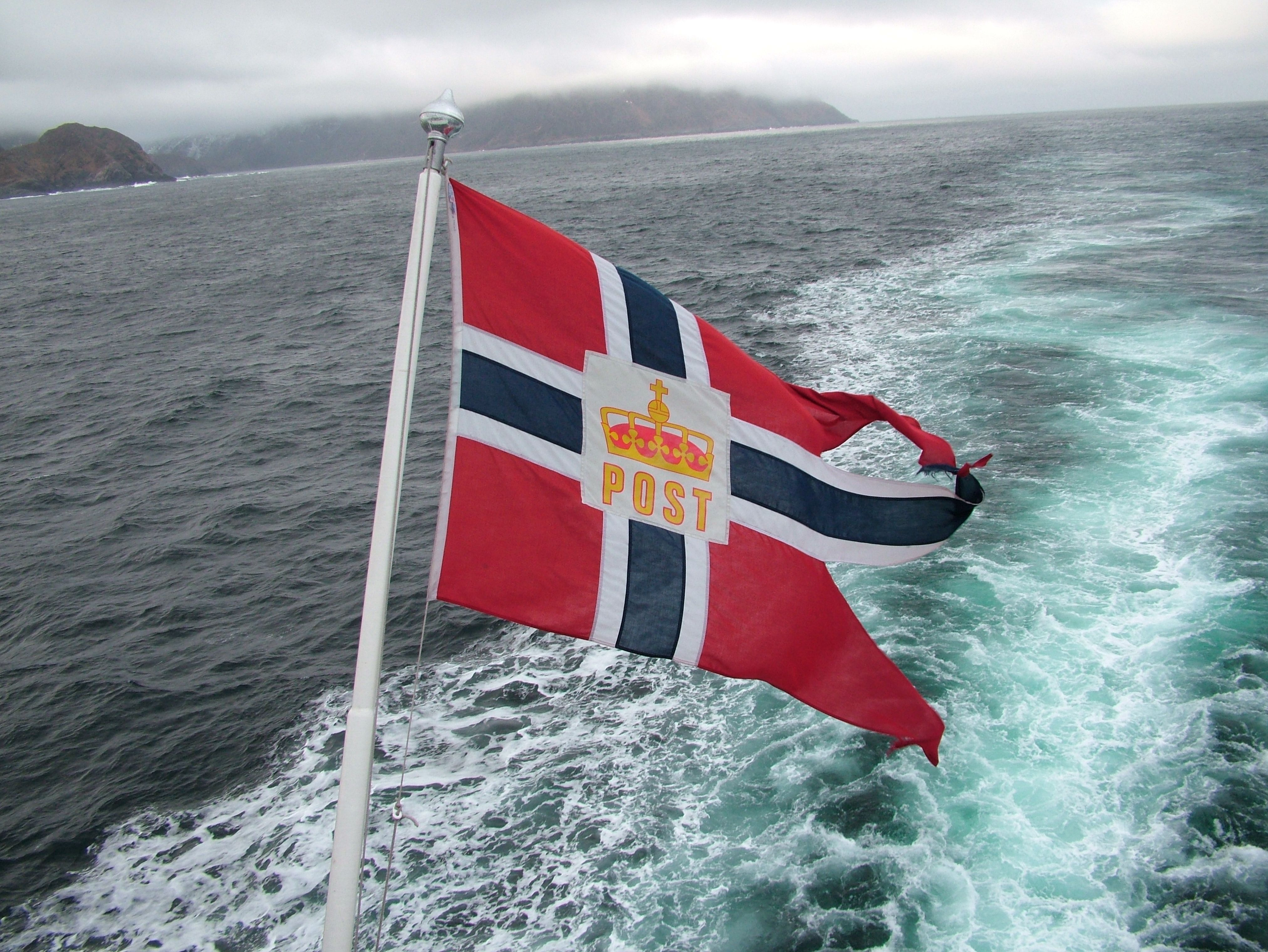 MS Finnmarken, ein Schiff der Hurtigruten, die Flagge am Heck, die das Schiff als Postschiff kennzeichnet